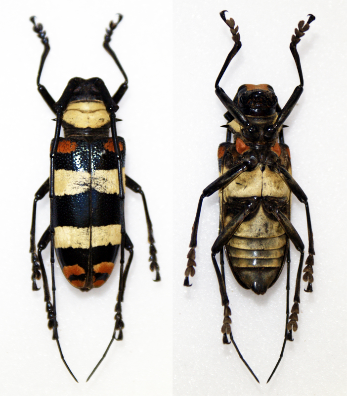 Heller,1896 Sex: Female Data: 04-2011 - Sulawesi - Indonesia Size: ?